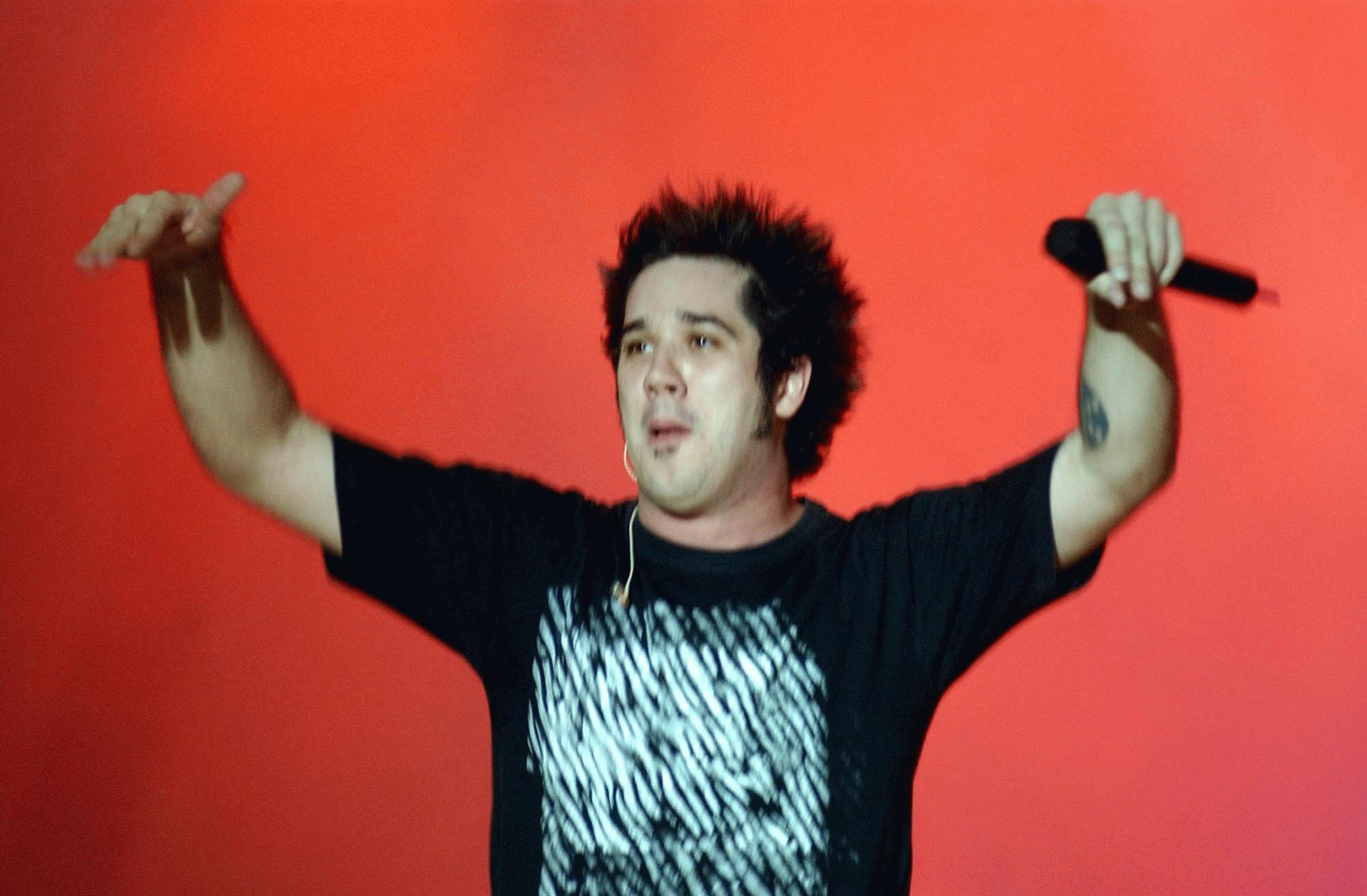 Rogério Flausino durante apresentação no Brasília Music Festival.